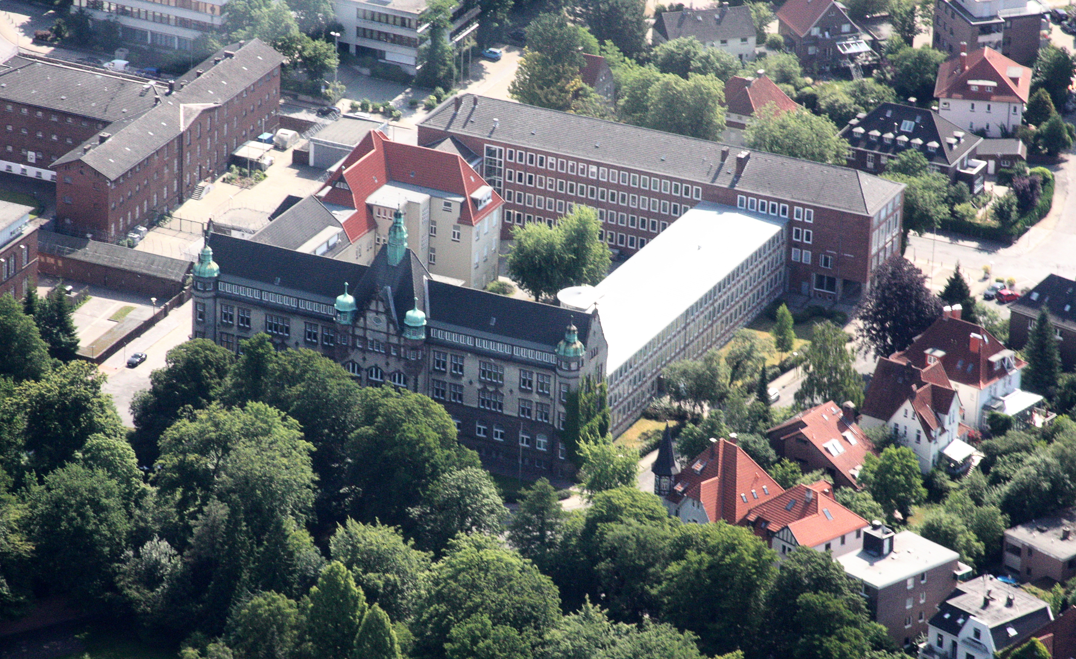 Luftaufnahmen Oldenburg (Oldenburg), mit Weiterflug nach Westen; 1500 Fuß Flughöhe; Juli 2010; Originalfoto bearbeitet: Tonwertkorrektur und Bild geschärft mit Hochpassfilter